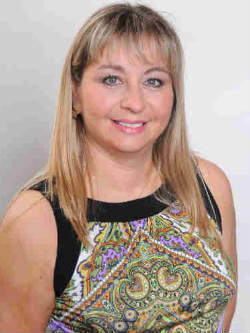 Marisol Turres Figueroa